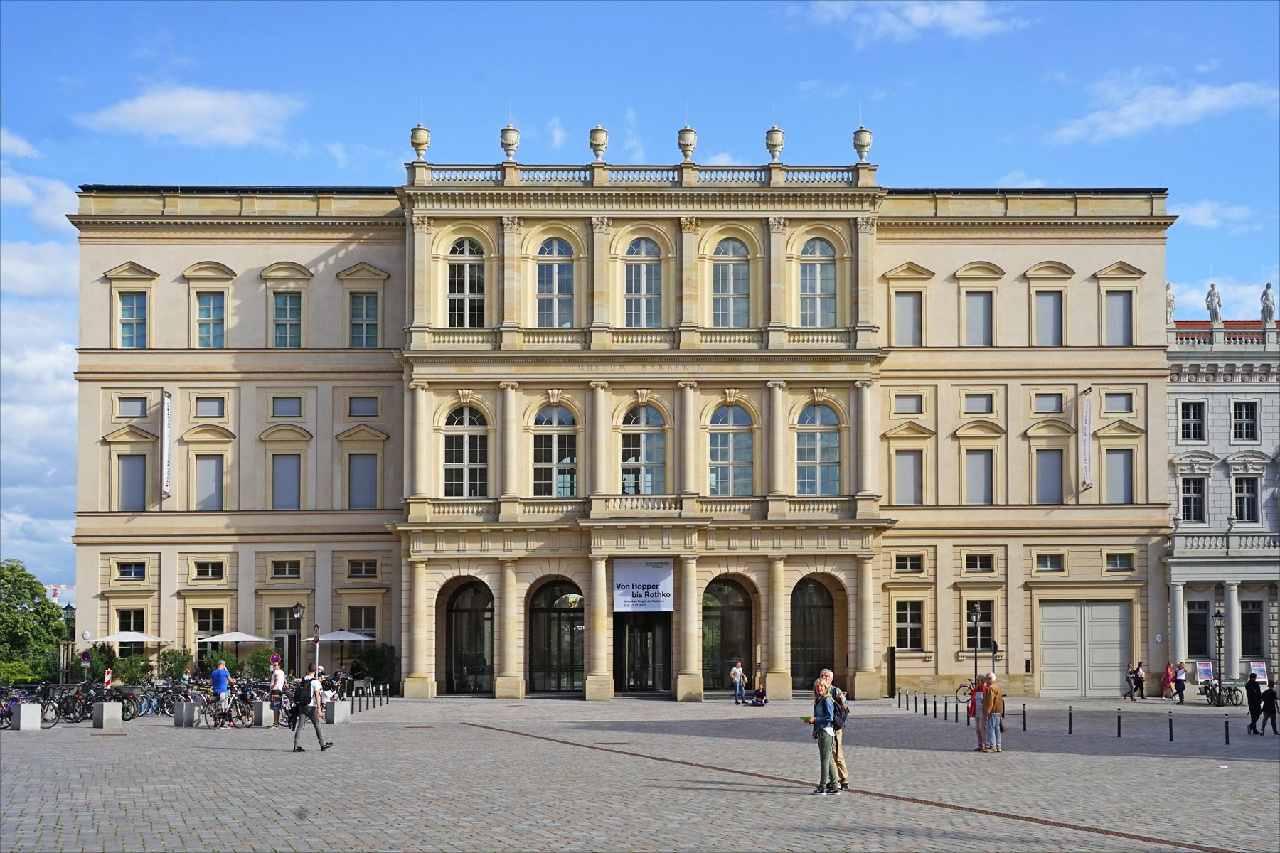 Le bâtiment d'origine a été construit au centre de la ville historique de Potsdam à la demande de Frédéric le Grand en 1771-1772 sur un modèle baroque italien adapté par l'architecte Carl von Gontard. Deux ailes ont été ajoutées au palais au milieu du XIXè siècle. Au cours des années, le bâtiment a hébergé des expositions d'art, une bibliothèque, des concerts, un cinéma. Il a été largement détruit en avril 1945 lors d'un bombardement. Les ruines ont été démolies en 1948 et l'espace est resté vide. En 2005, la ville a décidé la reconstruction du bâtiment avec des façades identiques à l'original (architectes : Hilmer & Sattler et Albrecht). Le financement a été assuré par la fondation Hasso Plattner. Les locaux ont été aménagés pour y accueillir un musée moderne et une partie de la collection du mécène allemand Hasso Plattner. Site du nouveau musée Barberini